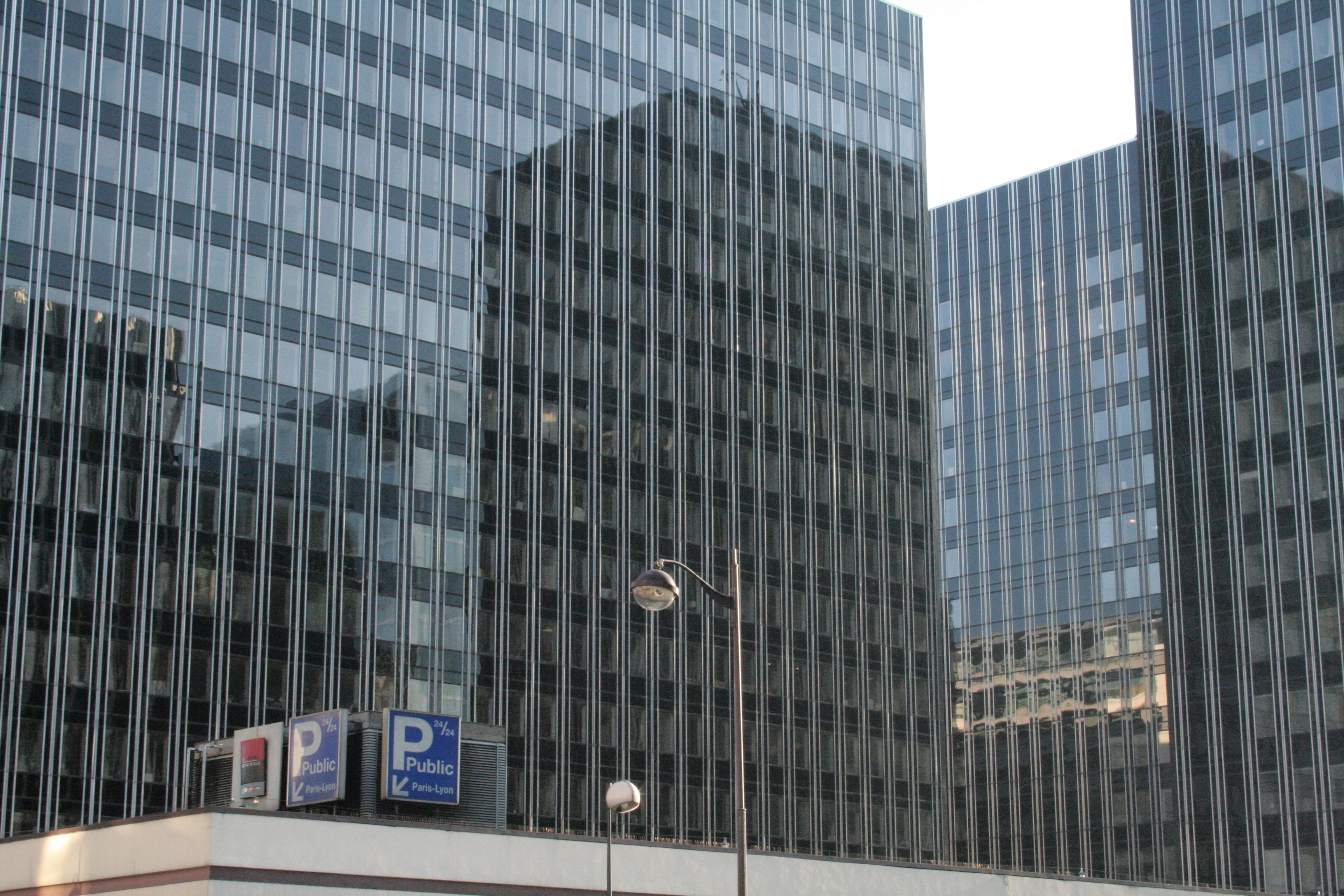 Photo d'un mur rideau près de la Gare de Lyon à Paris